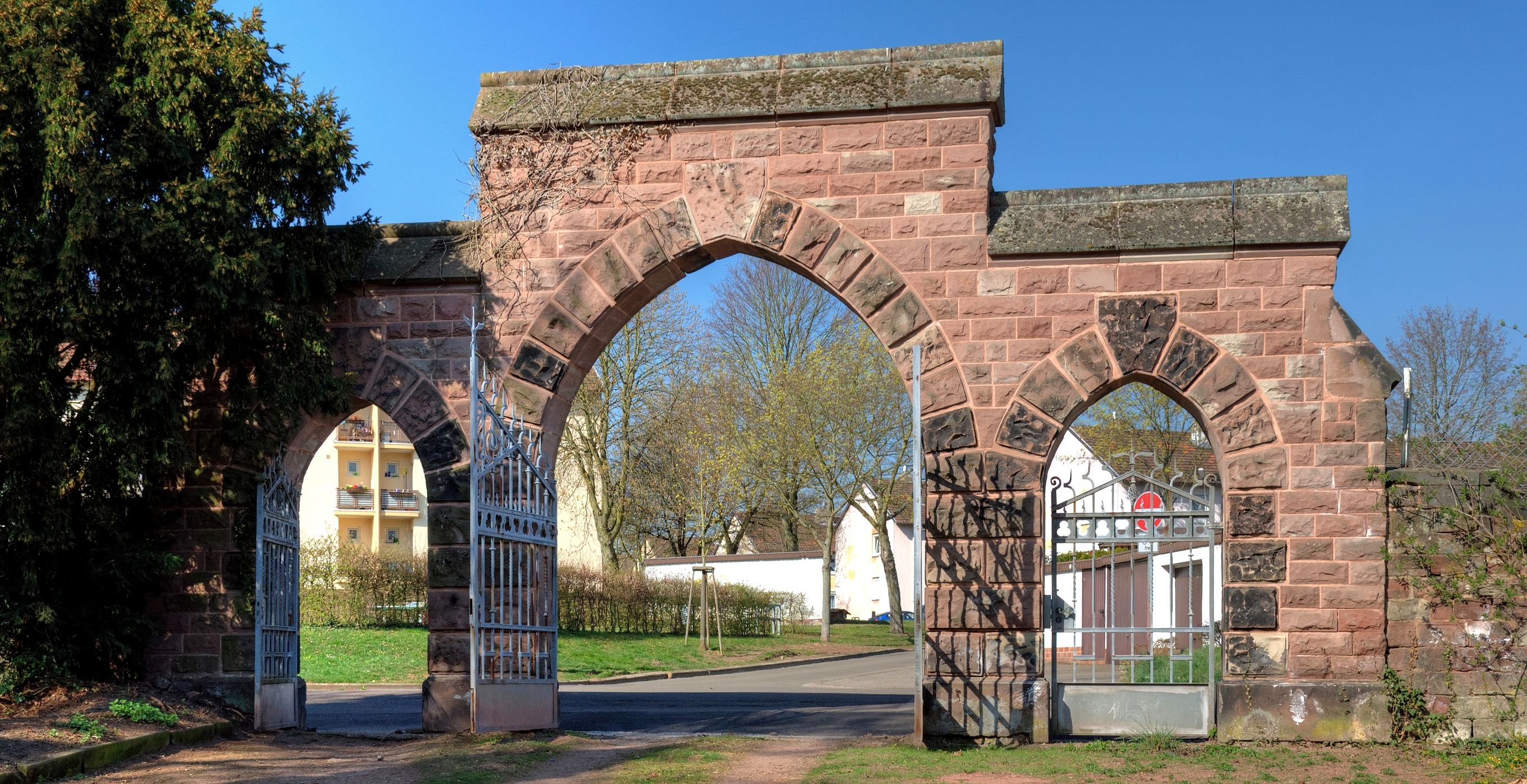 Jenneweg, Eingangsportal des Friedhofs, Saarbrücken